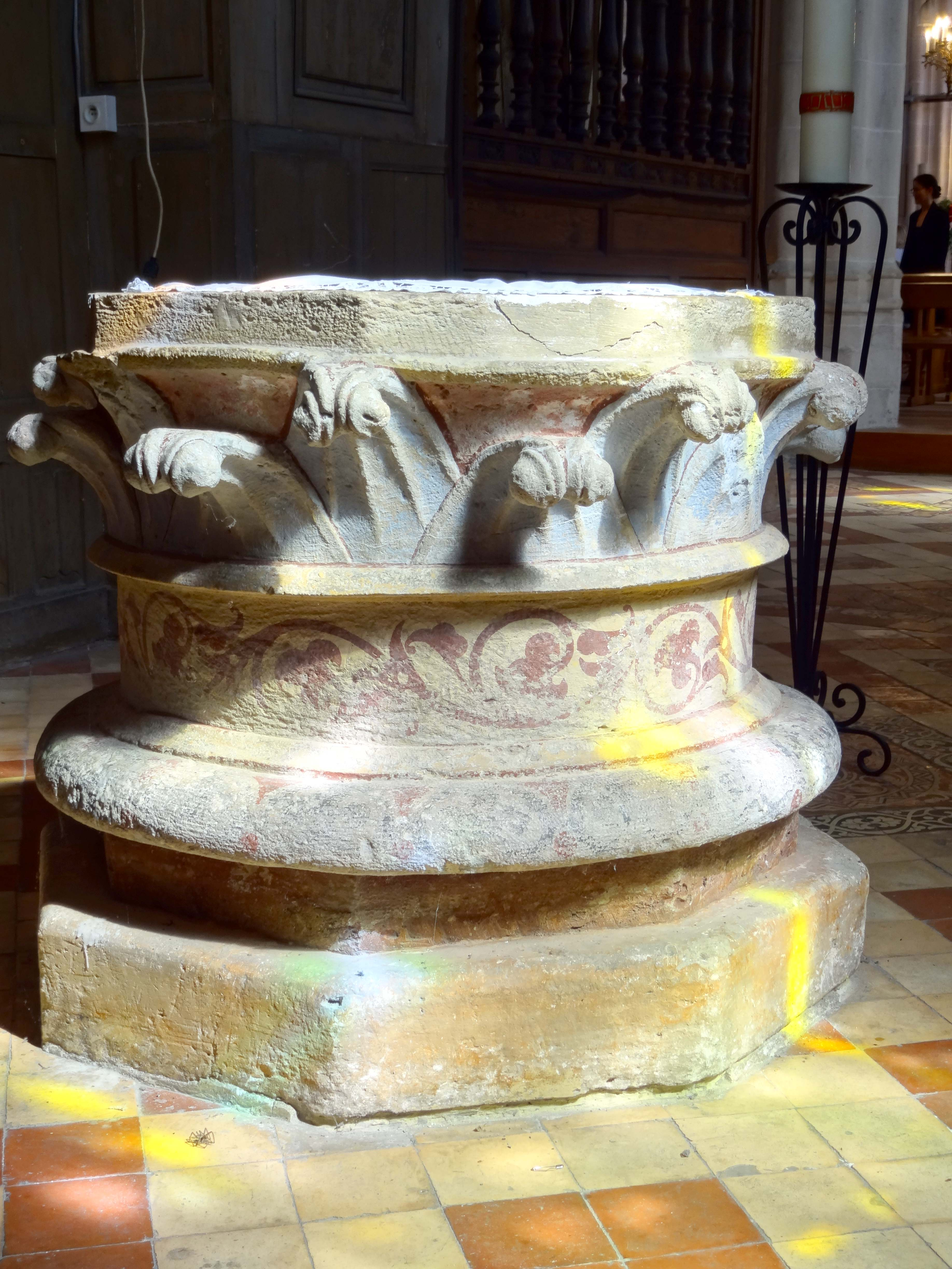 Mobilier de l'église - voir titre.